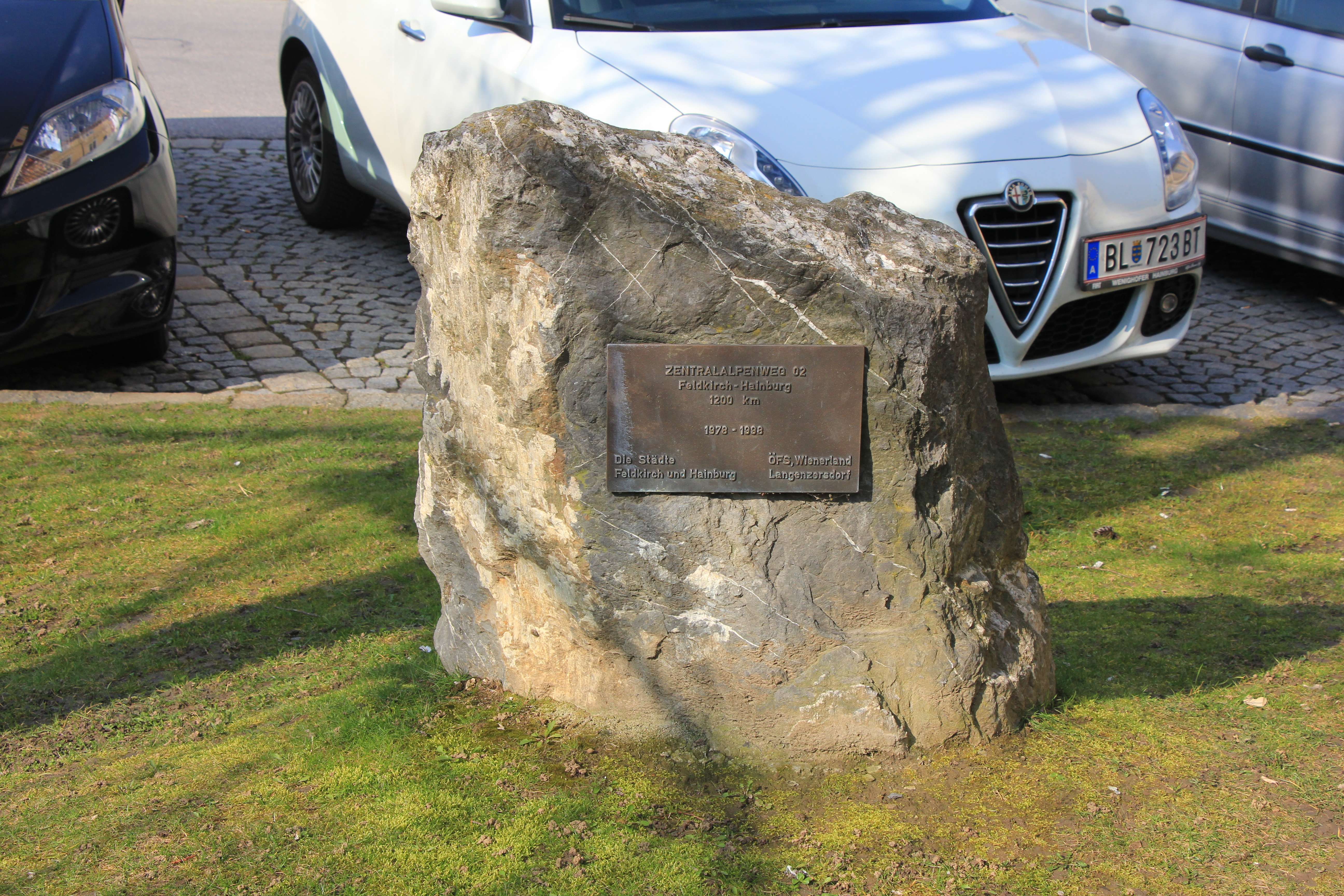 Zentralalpenweg 02, Feldkirch Hainburg - Stein am Hauptplatz in Hainburg an der Donau